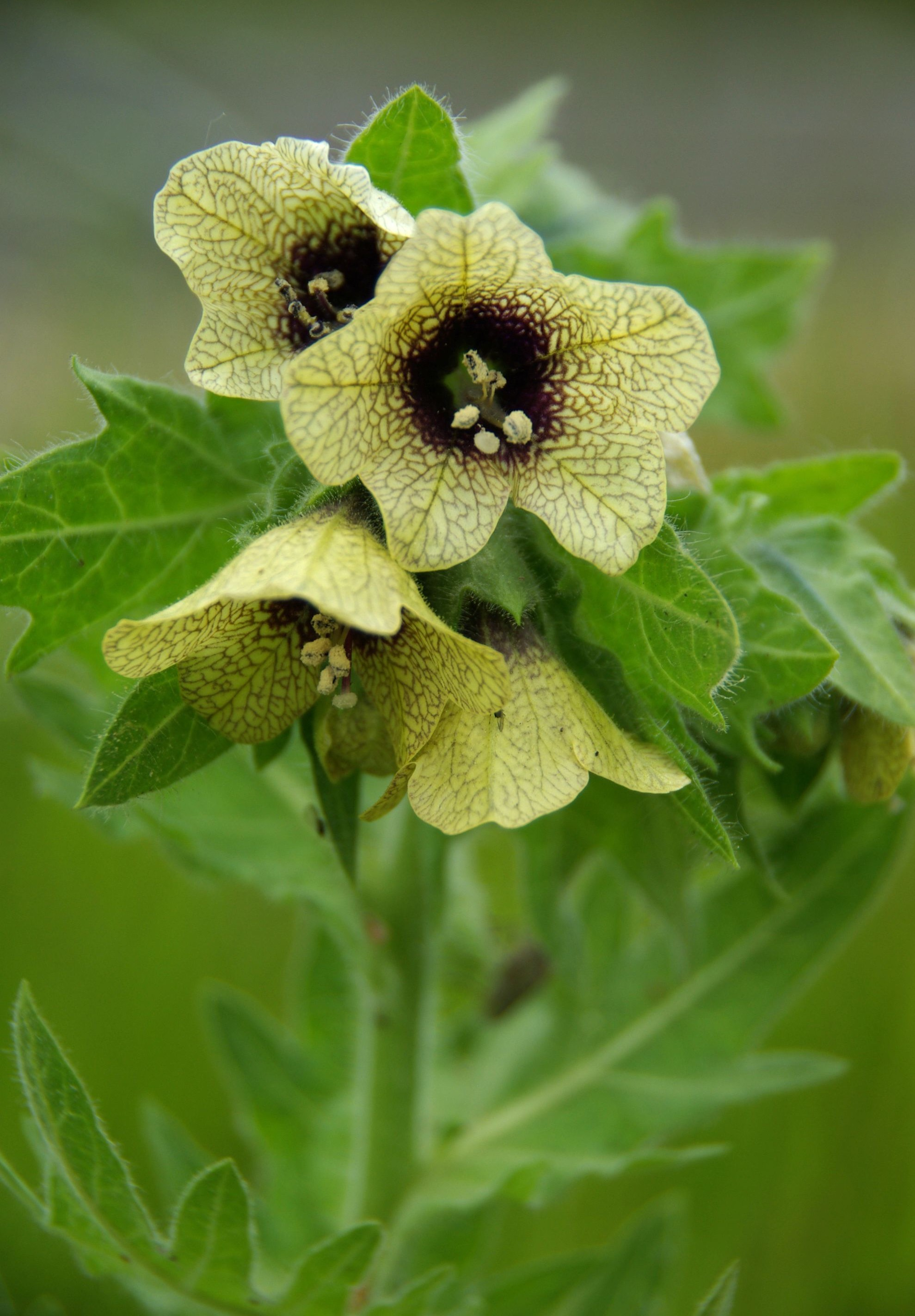 Koera-pöörirohi on laialt tuntud taimenimi, kuigi teda ennast võib harva kohata.Leida võib teda kraavi äärtelt,prahihunnikutest.Koera-pöörirohi on üleni kleepuvate karvadega kaetud. Teiseks on tal ebameeldiv lõhn. Kolmandaks on tal väga omapärased õied. Need on kellukakujulised, asuvad pika õisiku ülaküljel ja on rohekas- või roosakaskollased, tumedate lillakate soontega. Taim on mürgine.